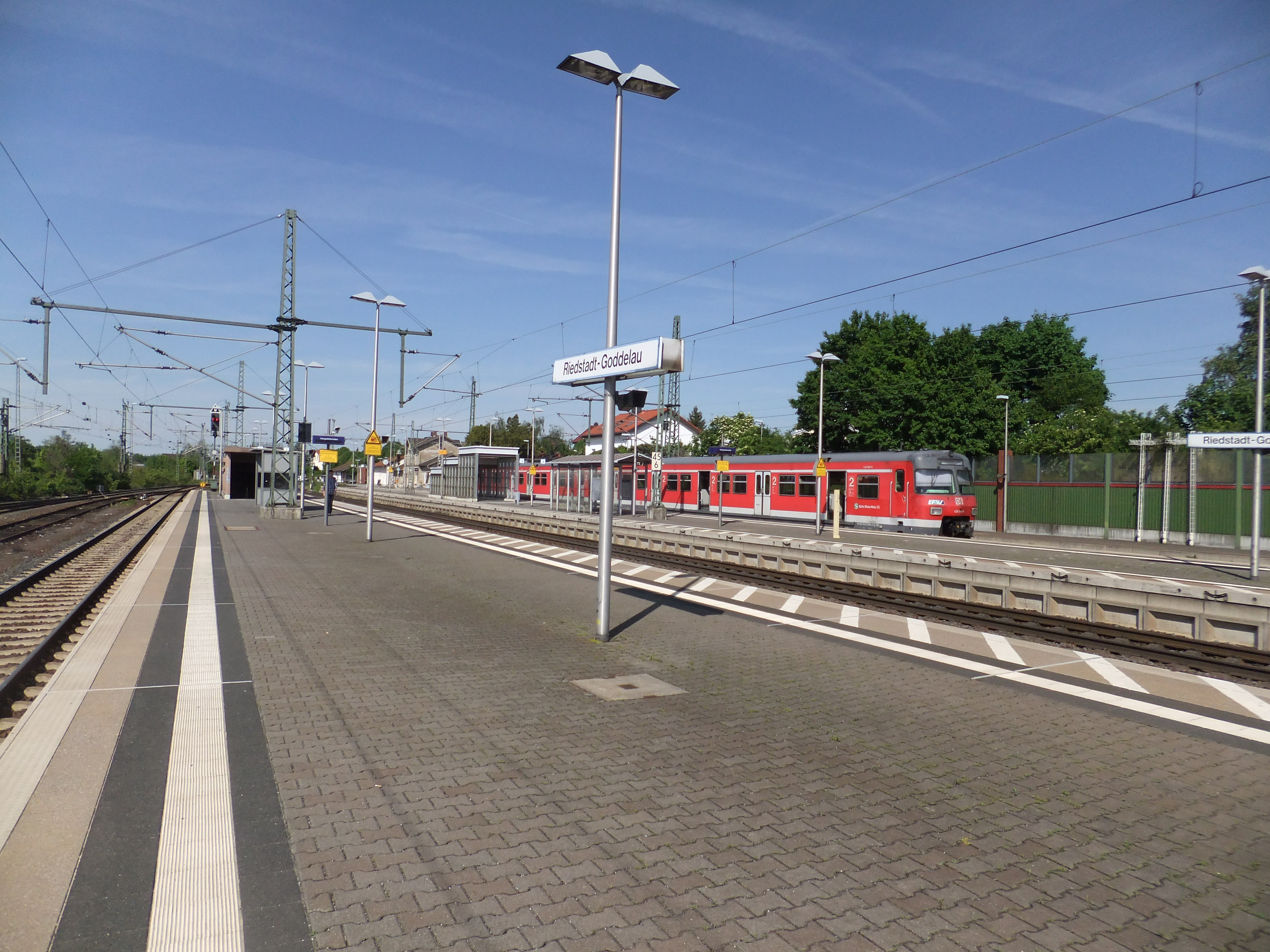 Die Bahnsteige des Bahnhofs Riedstadt-Goddelau